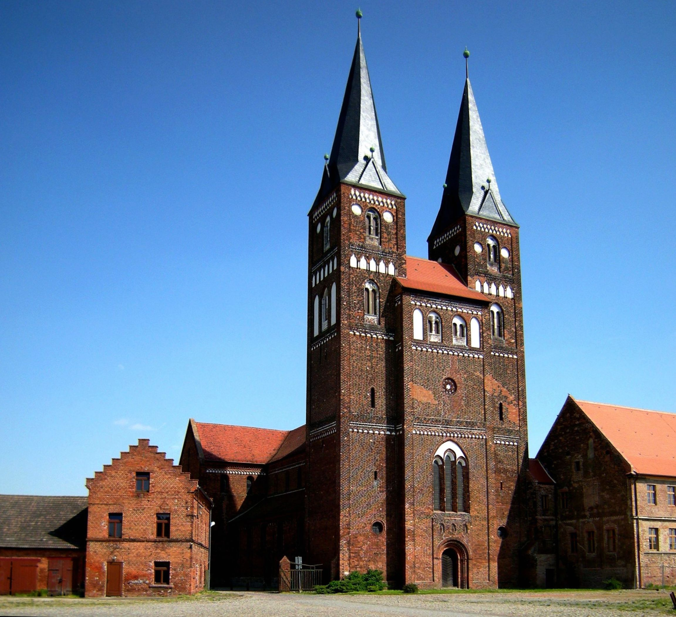 frühgotische oder auch romano-gotische Doppelturmfassade (1256–1262) der Abteikirche Jerichow (Chor und Schiff 1149–1172)